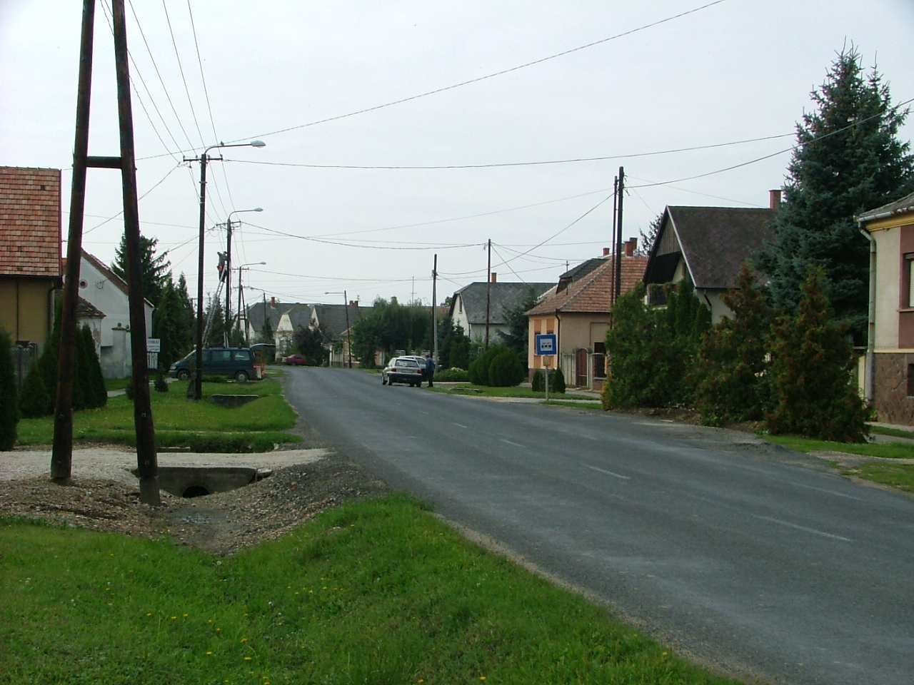 Völcsej főutcája